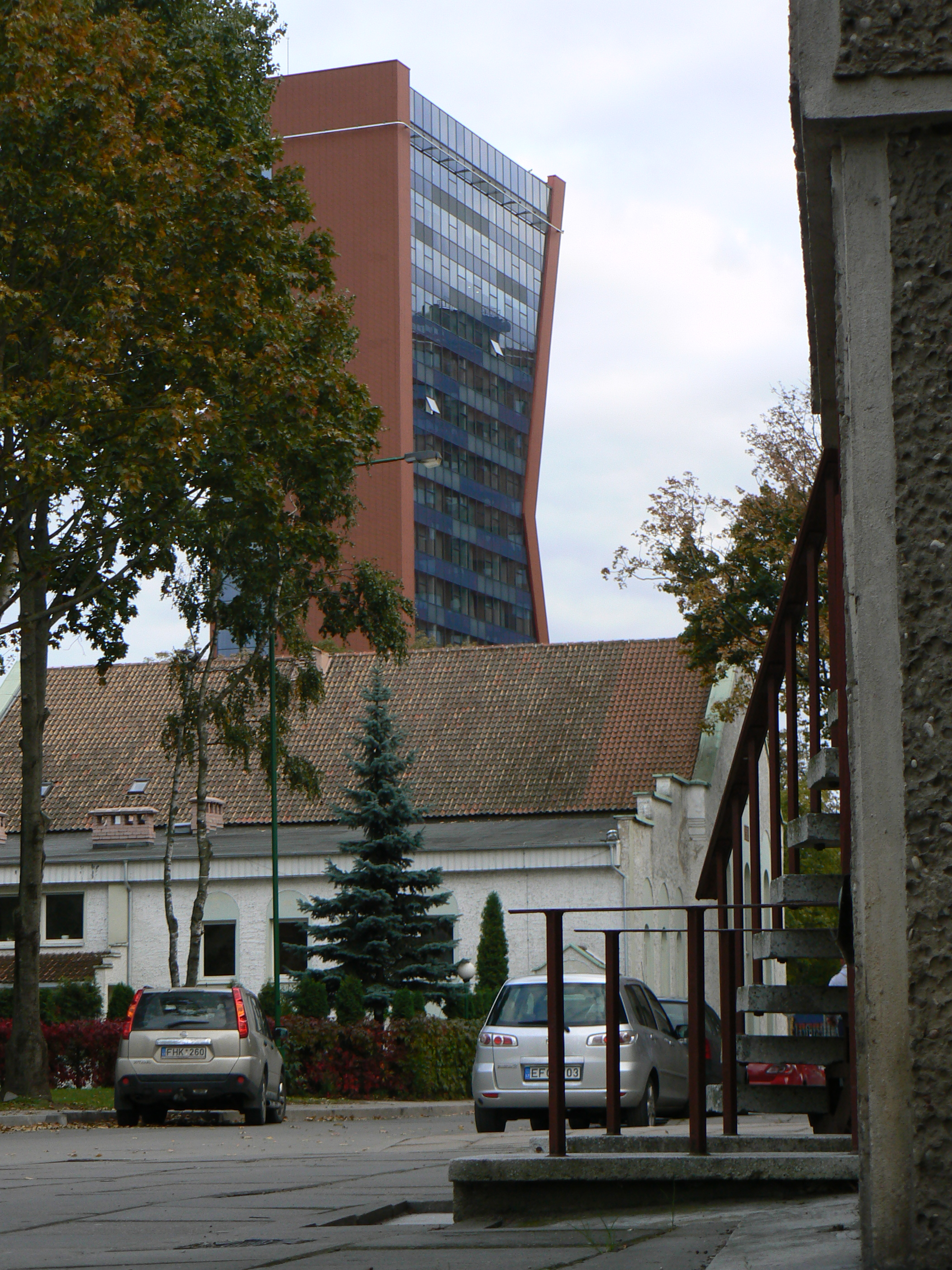 Pohled na "K" budovu z dvojice "KD" hotelu Klaipėda v Klaipėdě a to z náměstí Kuršių aikštė (náměstí Kuršů; podle vymřelého národa Kuršů), t. j. od severu. Budova v popředí je evangelický kostel baptistů (evangelikų baptistų bažnyčia), založený r. 1841Lietuvių: Vaizdas į KD nuo Kuršių aikštės (Klaipėda)